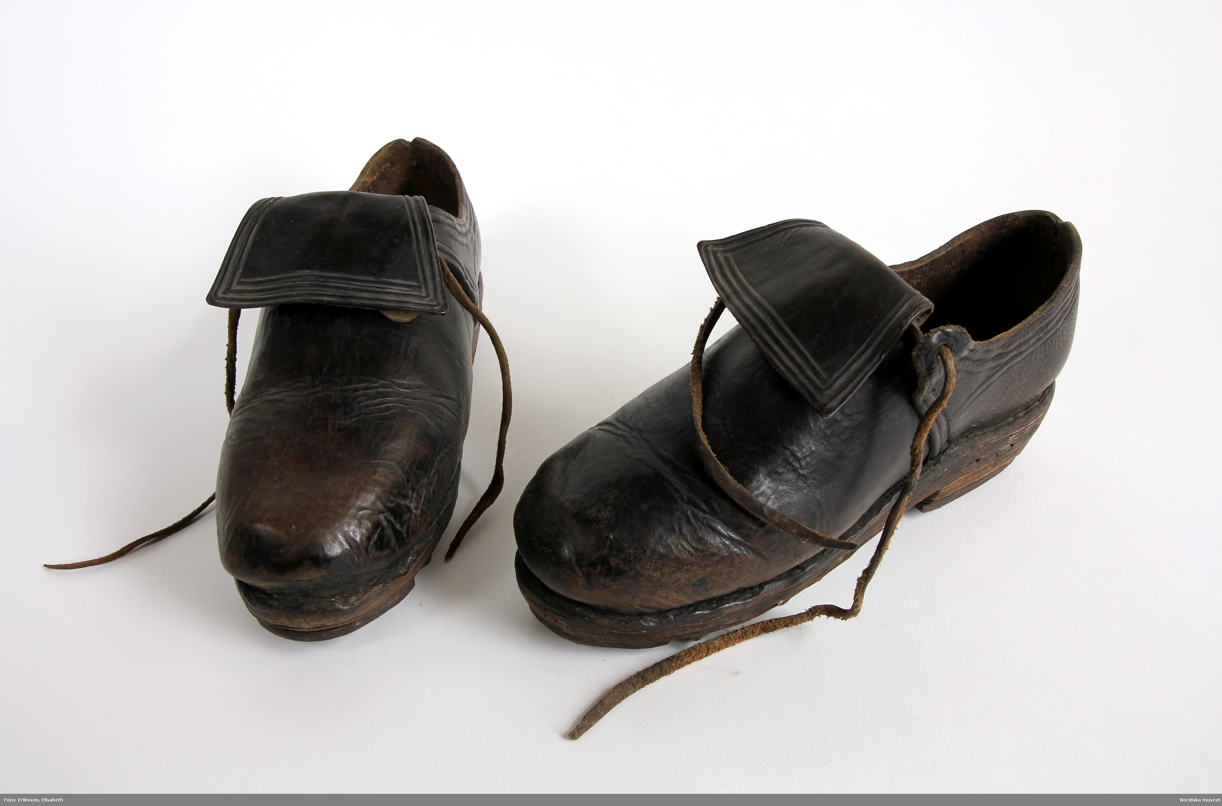 Huvudliggaren: "Mandräkt från Boda sn Dalarna A. Rock, längd 107 cm (m. kraglinning) B. Skinnbyxor C. Väst "livstycke" D. Skor E. Förskinn "skimpa" F. Bröstlapp "halskrage" A. Rock av svart vadmal, 2 fram- och 2 ryggstycken, helskurna. På insidan av framkanterna röda klädeslister, den högra med 6 hakar av mässing, på den vänstra 6 hyskor på utsidan. Isydd ärm med ärmsprund med hake och hyska och infodring av oblekt linnelärft. Kring halsen en 2,4 cm bred halslinning. Öppningar i sidsömmar. Berit Eldvik 2004